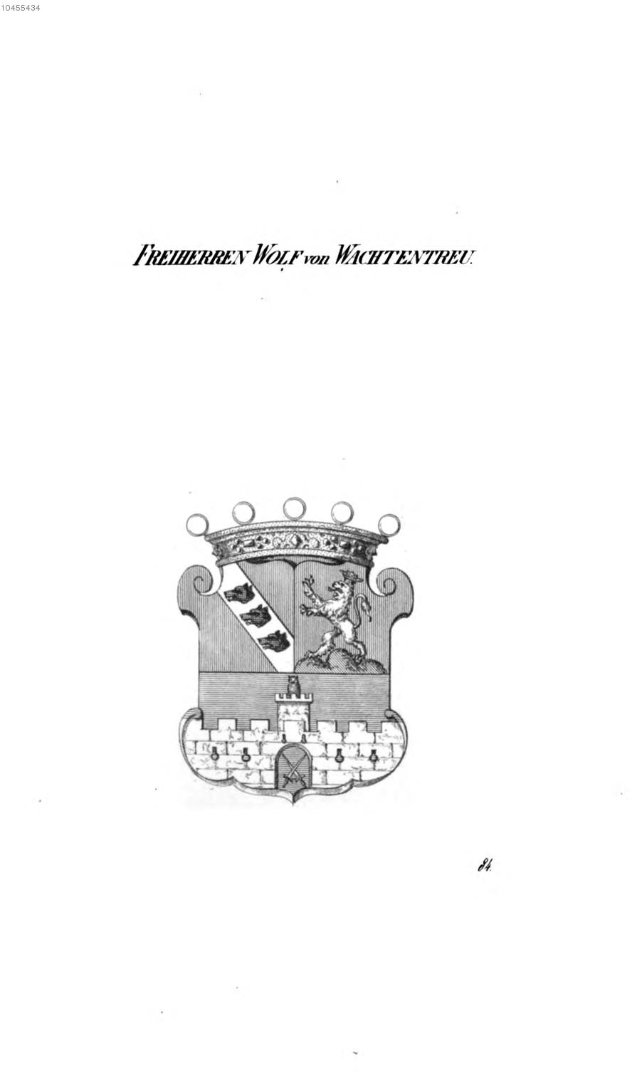 Wappen Wolf von Wachtentreu - Tyroff AT.jpg